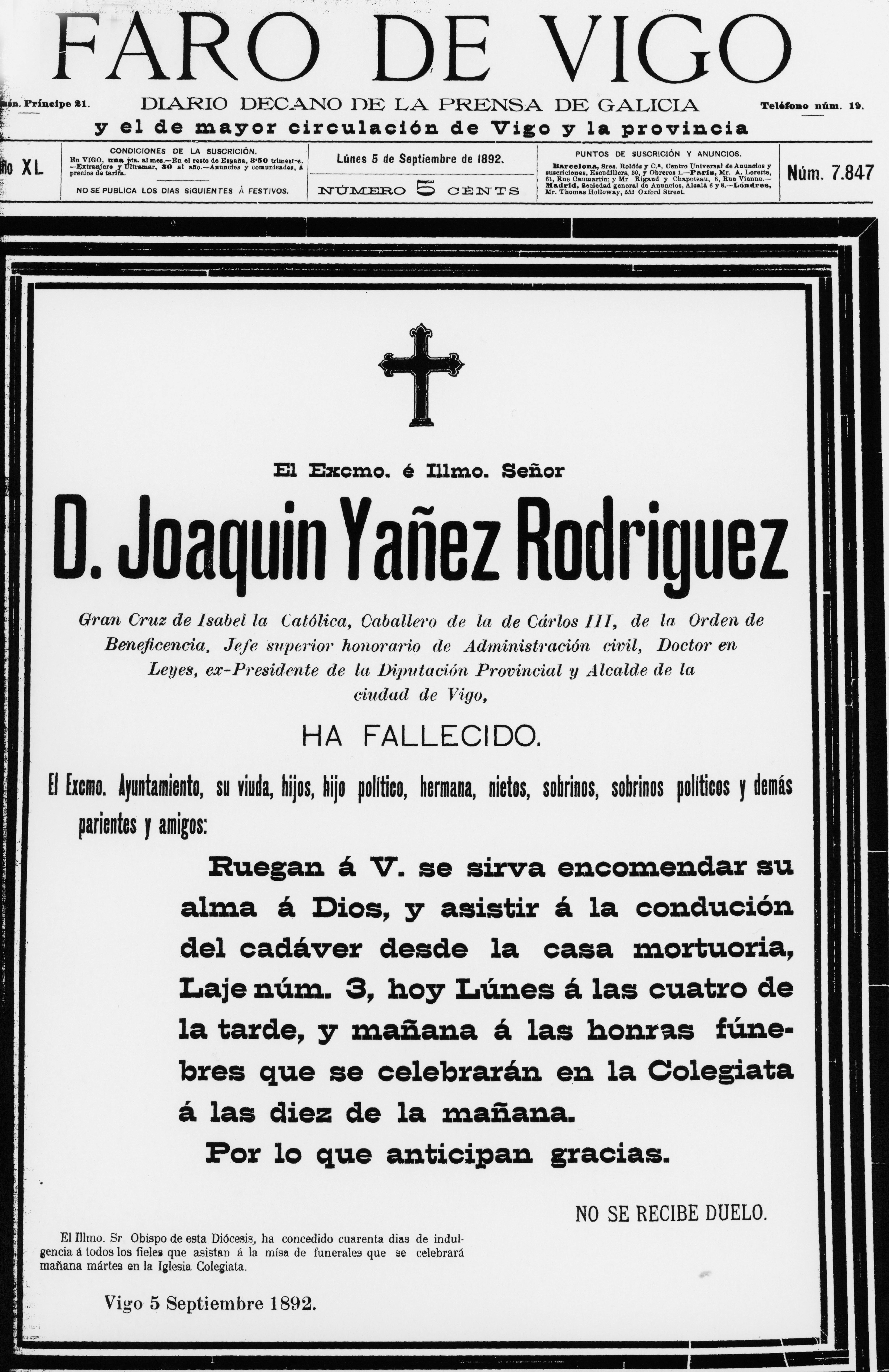 Joaquín Yáñez Rodríguez 1814-1892, necrológica